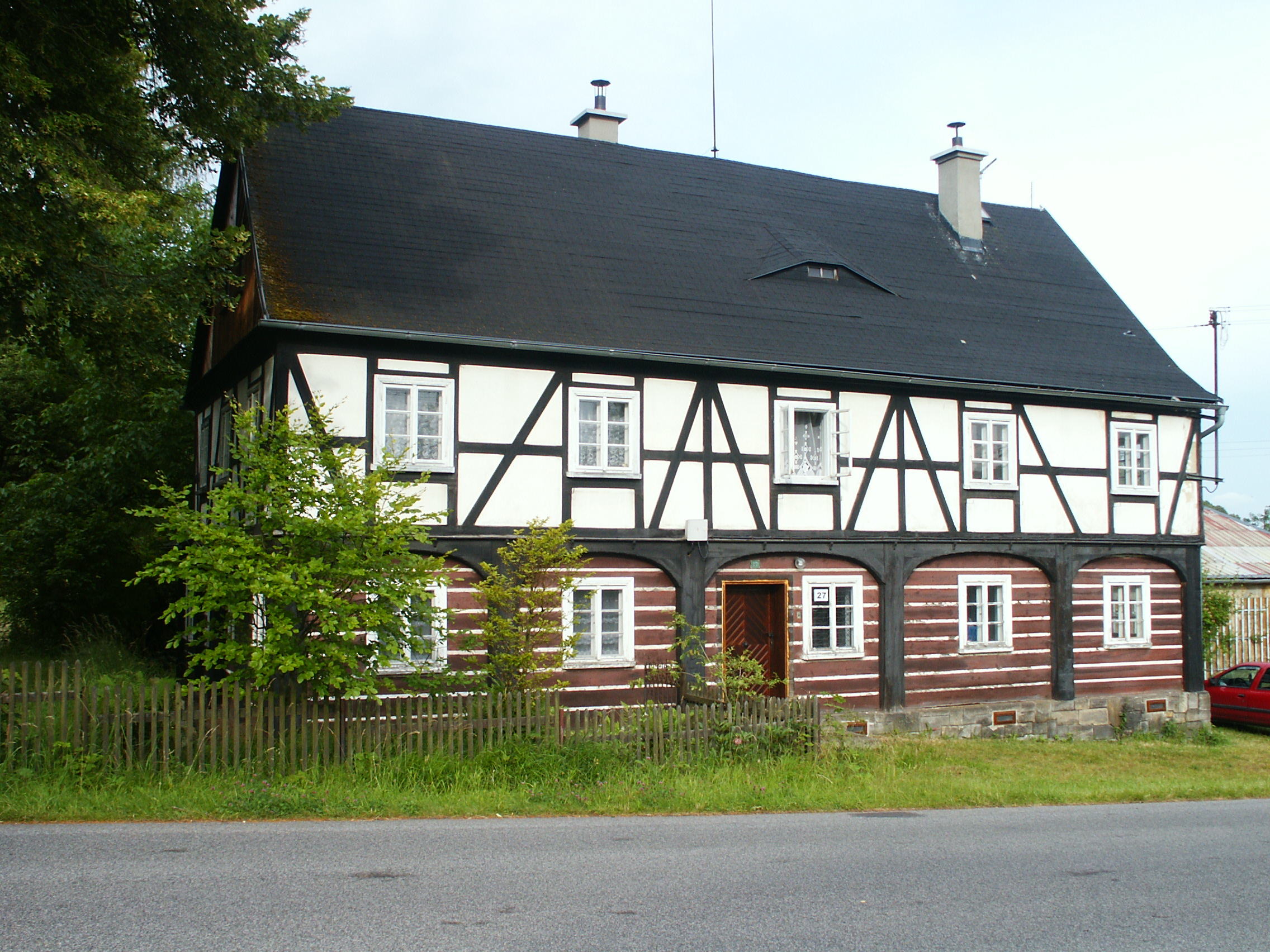 Venkovská usedlost, Krásné Pole 27, Krásné Pole (Chřibská).